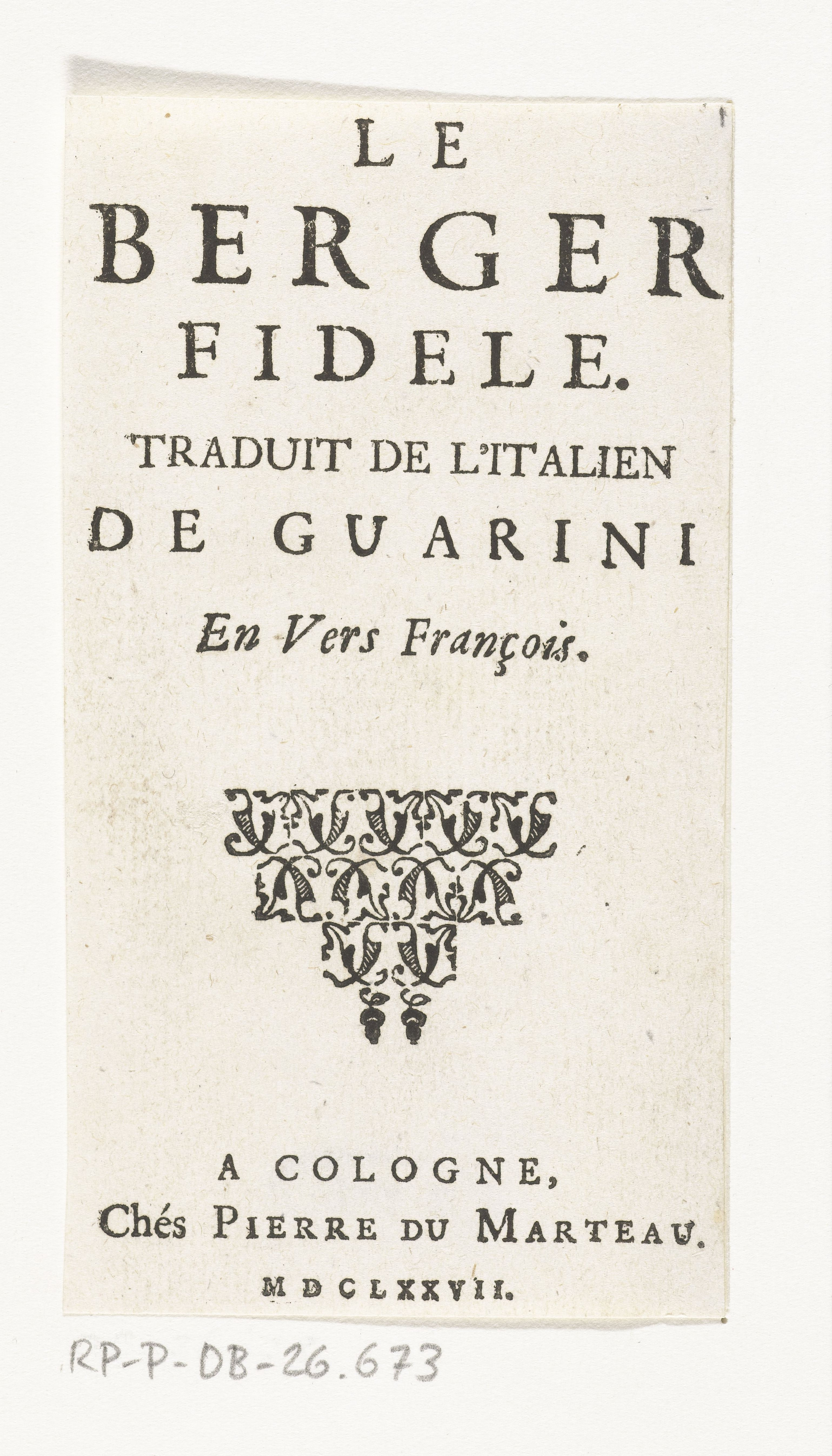 IdentificatieTitel(s): Titelpagina voor G.B. Guarini, Le Berger Fidele, Cologne, Pierre du Marteau, 1677Objecttype: prent titelpagina Objectnummer: RP-P-OB-26.673Opschriften / Merken: verzamelaarsmerk, verso, gestempeld: Lugt 2228VervaardigingVervaardiger: uitgever: Pierre Marteau (vermeld op object)Plaats vervaardiging: KeulenDatering: 1677Fysieke kenmerken: tekst in boekdrukMateriaal: papier Techniek: boekdrukAfmetingen: blad: h 105 mm × b 59 mmToelichtingTitelpagina voor: G.B. Guarini, Le berger fidele, Keulen, Pierre Marteau, 1677 (fictief impressum, eigenlijk gedrukt in Leiden bij de gebroeders Hackius)OnderwerpWat: title-pageVerwerving en rechtenVerwerving: onbekendCopyright: Publiek domein